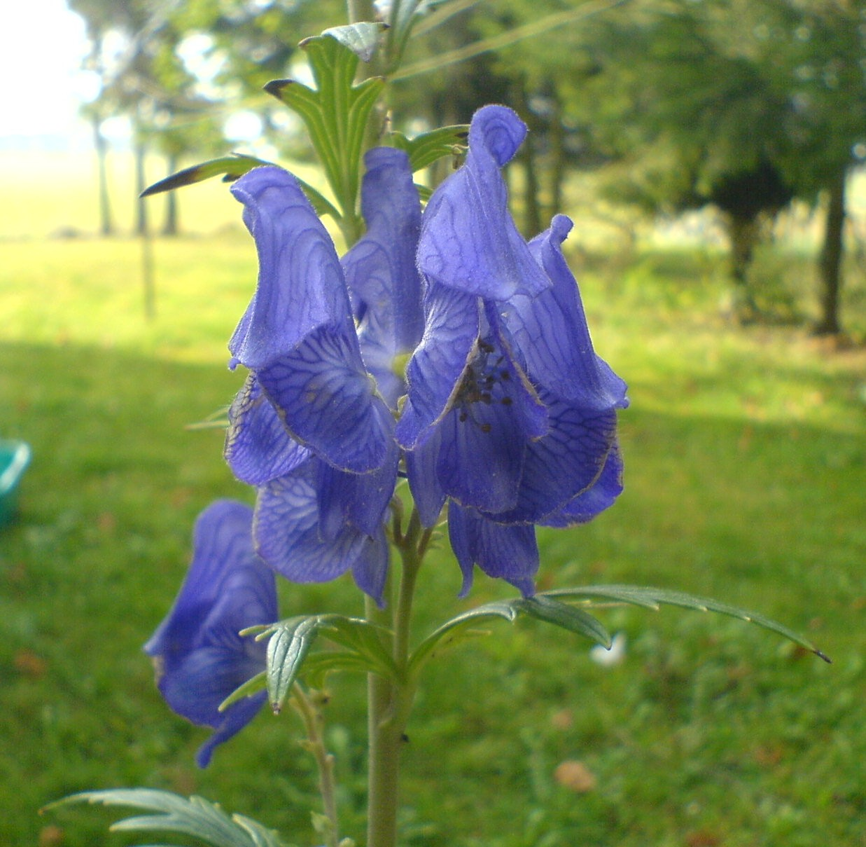 Blauer Eisenhut, St. Oswald, Niederbayern (Gabl)